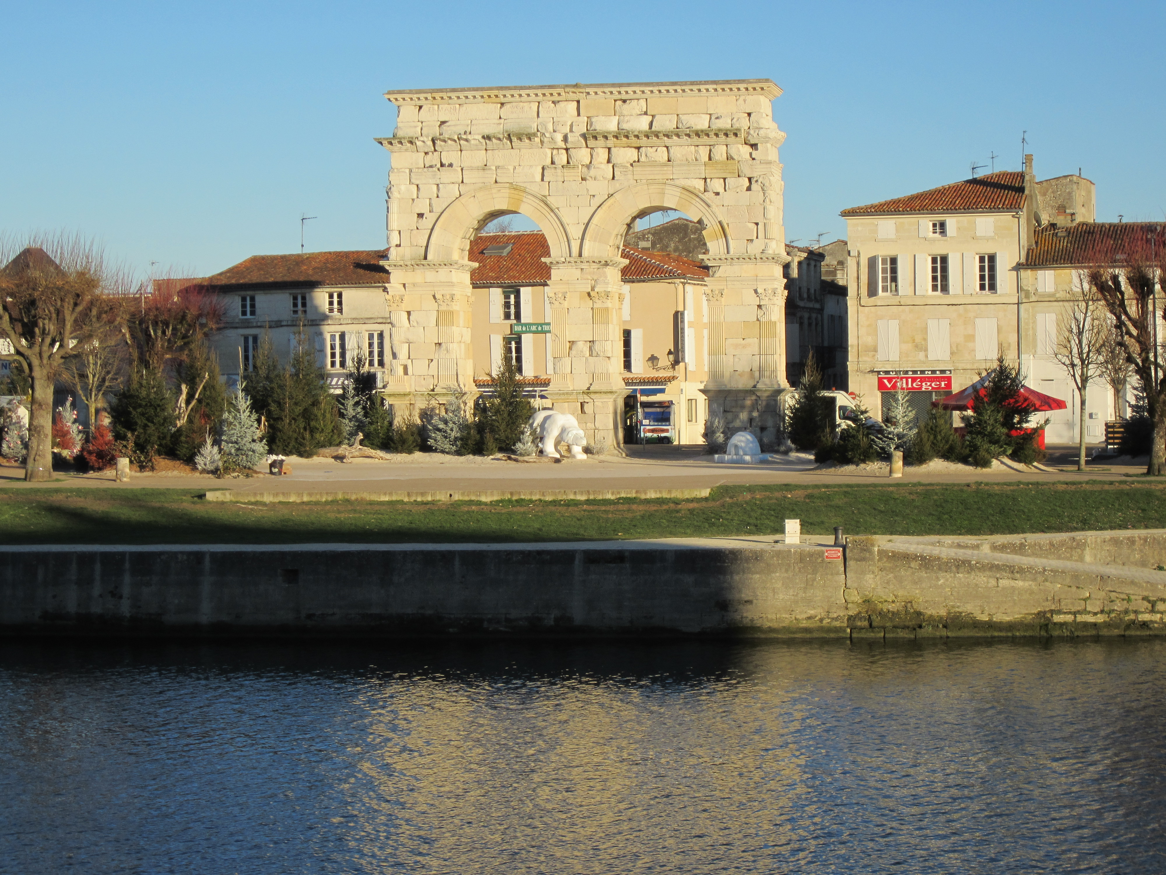 Arc de Germanicus, Saintes .